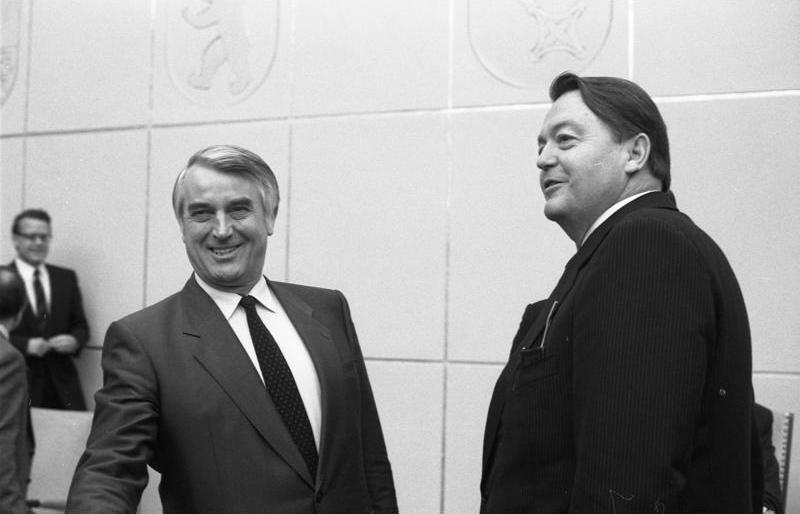 7.11.1986 Bundesratssitzung- Antrittsrede von Bundesratspräsidenten Holger Börner